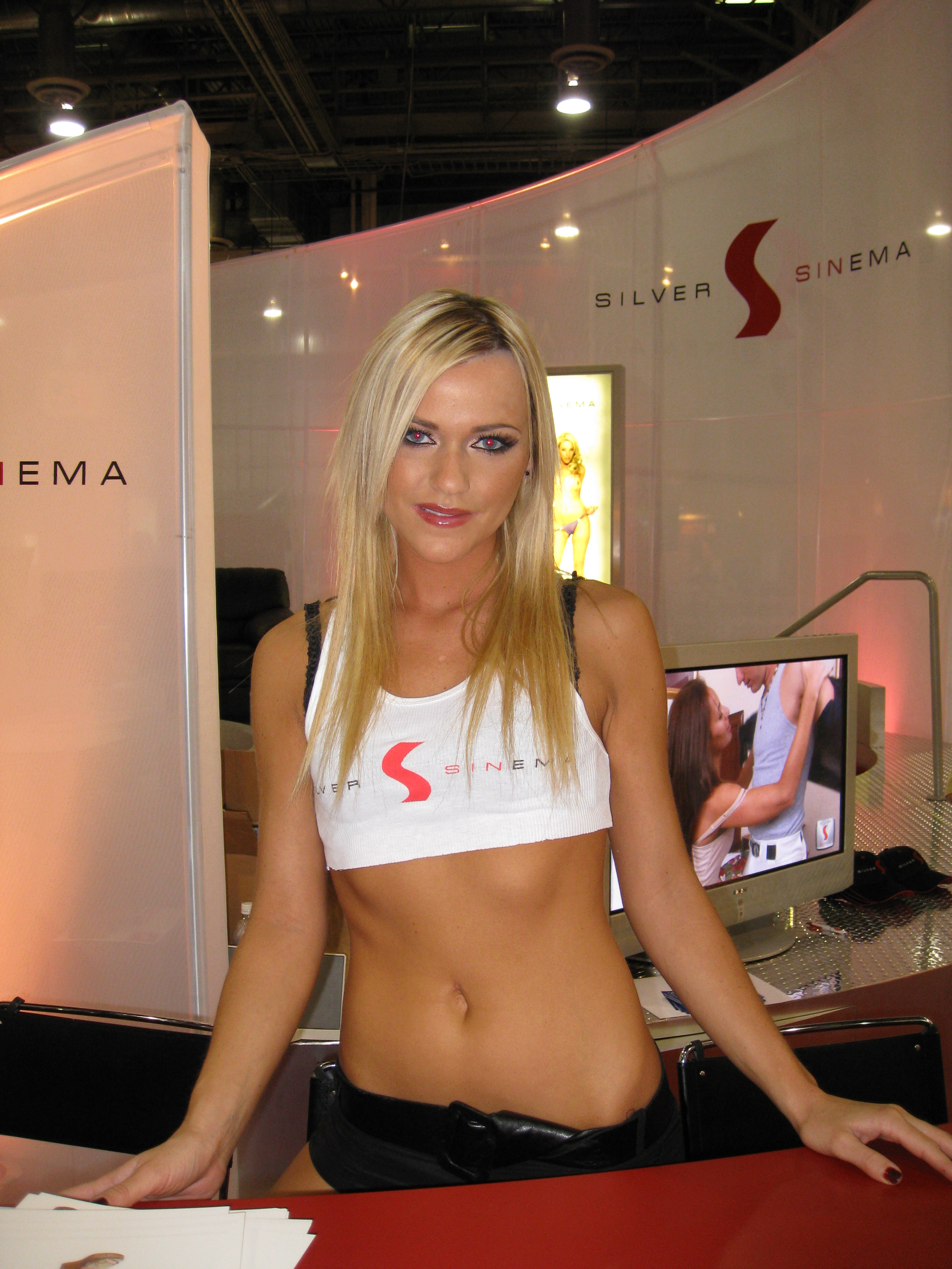 AEE2008_Day2 022